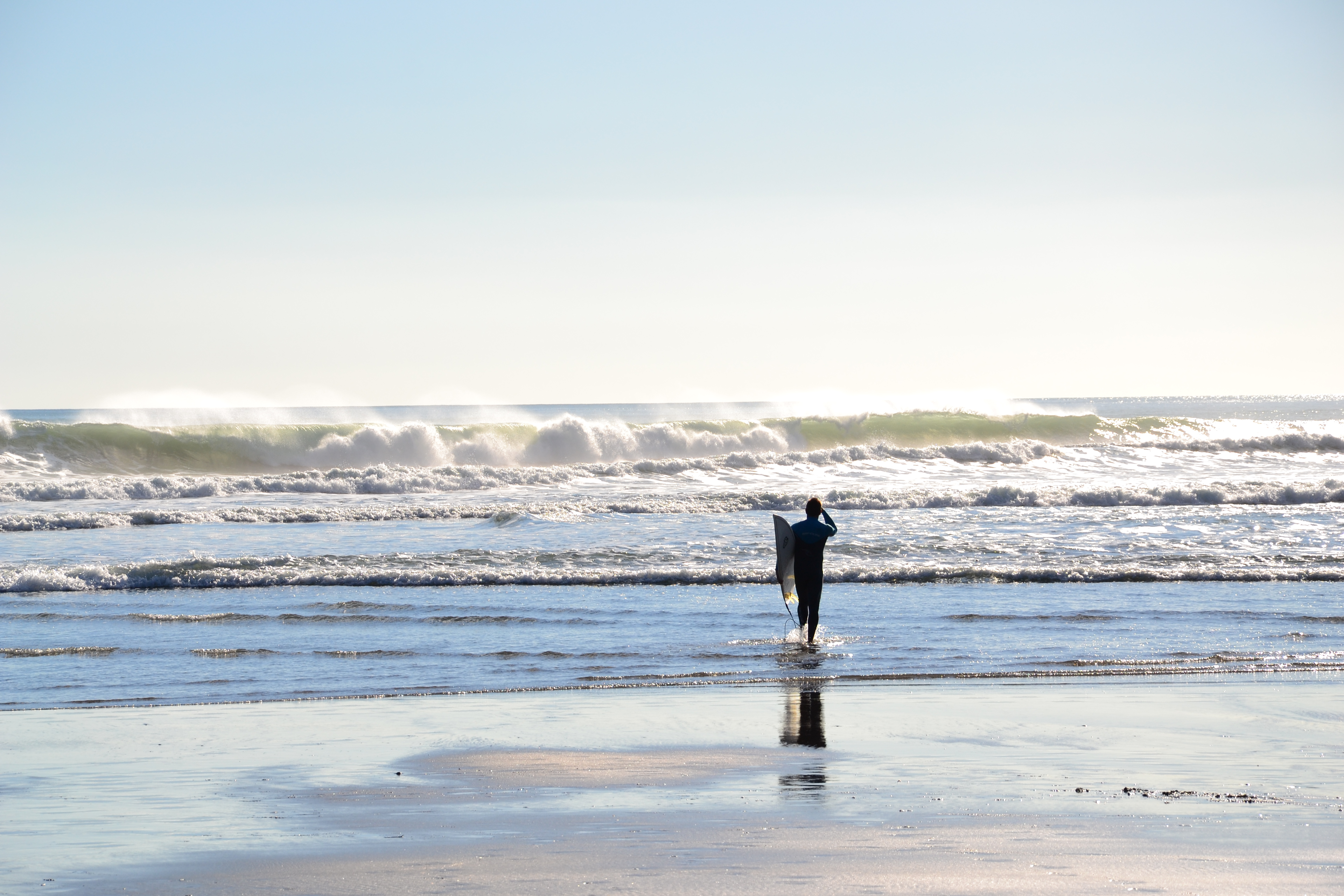 Lone Surfer